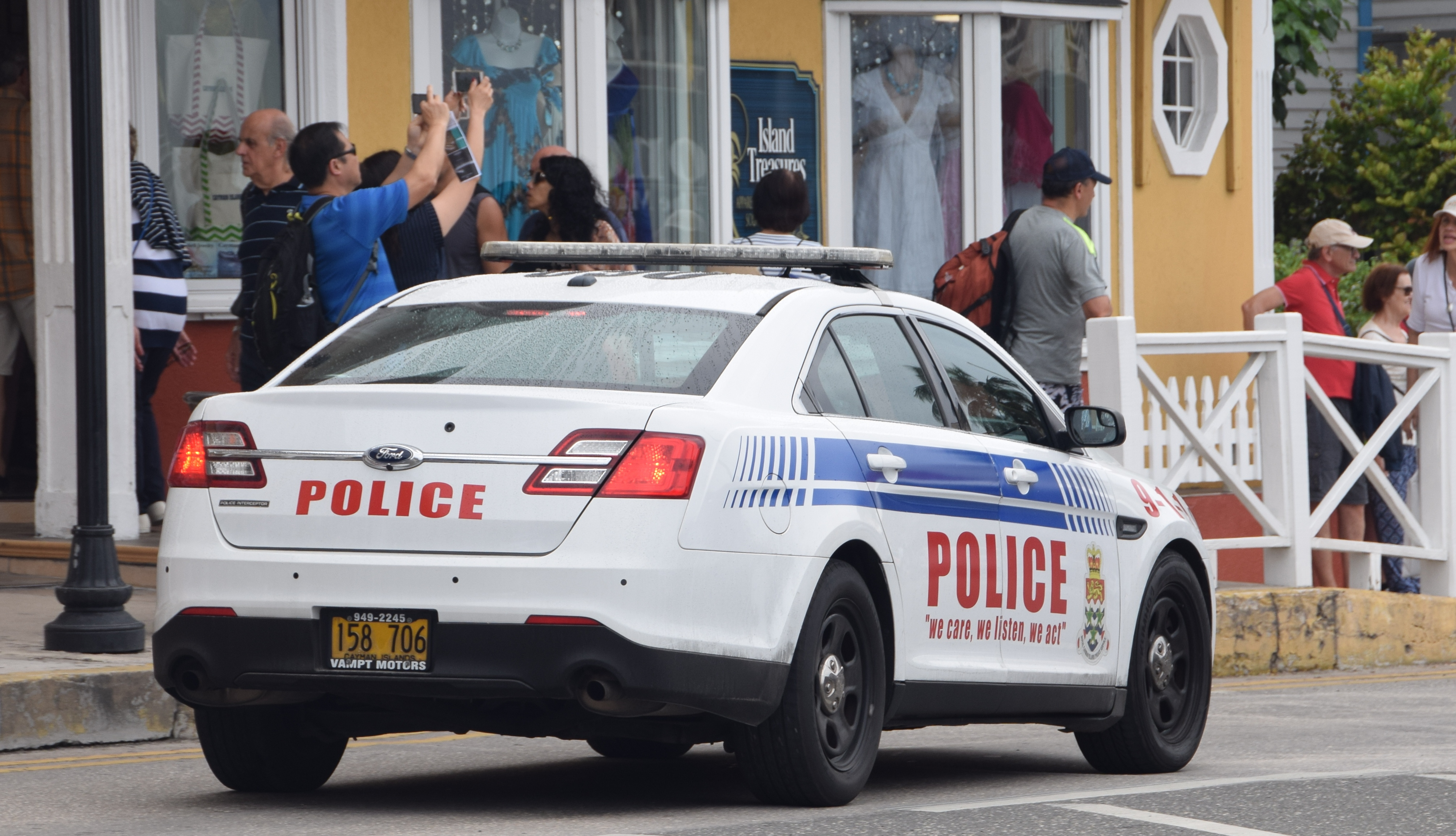 Politie auto op de Kaaimaneilanden